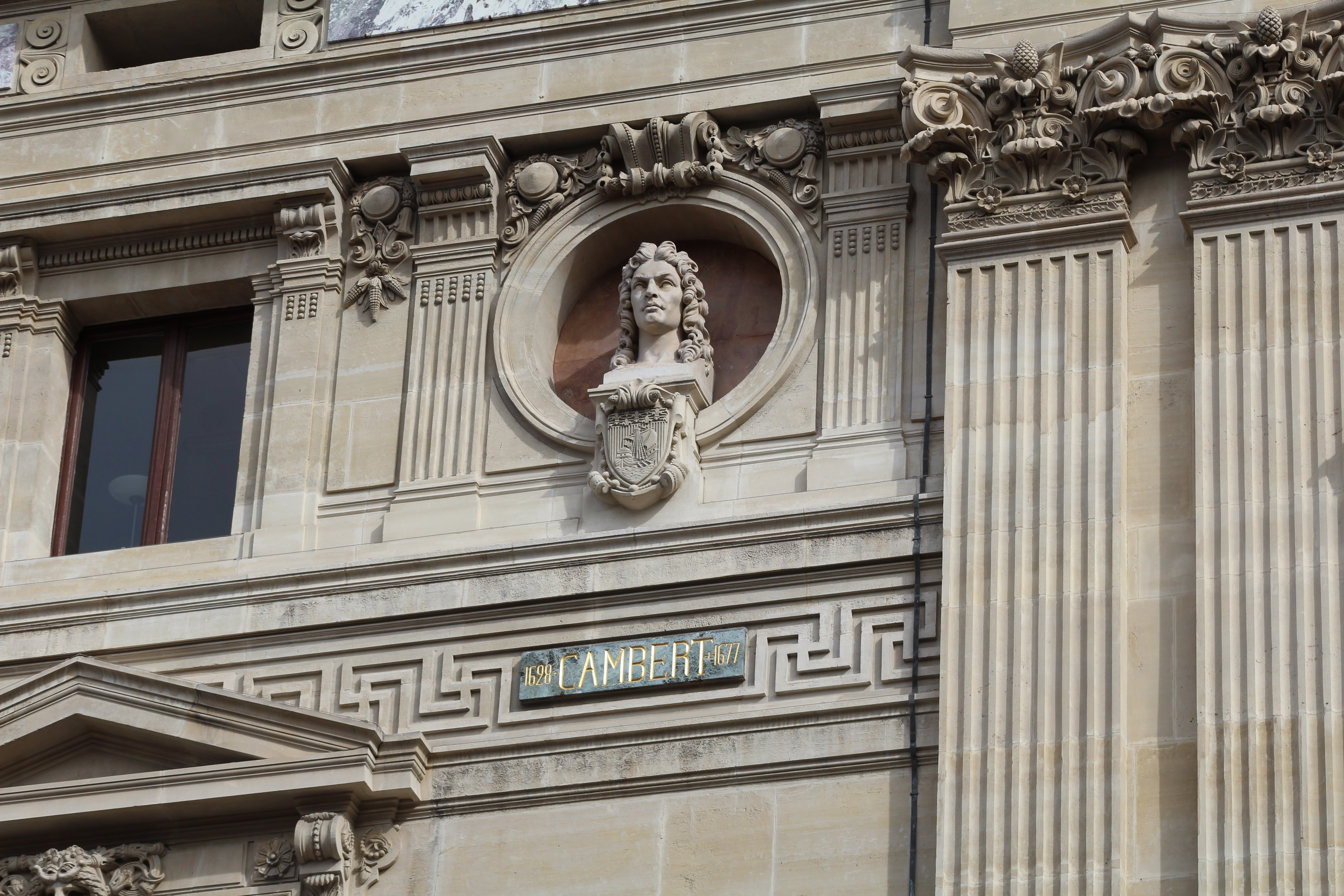 Buste de Cambert au Palais Garnier à Paris.